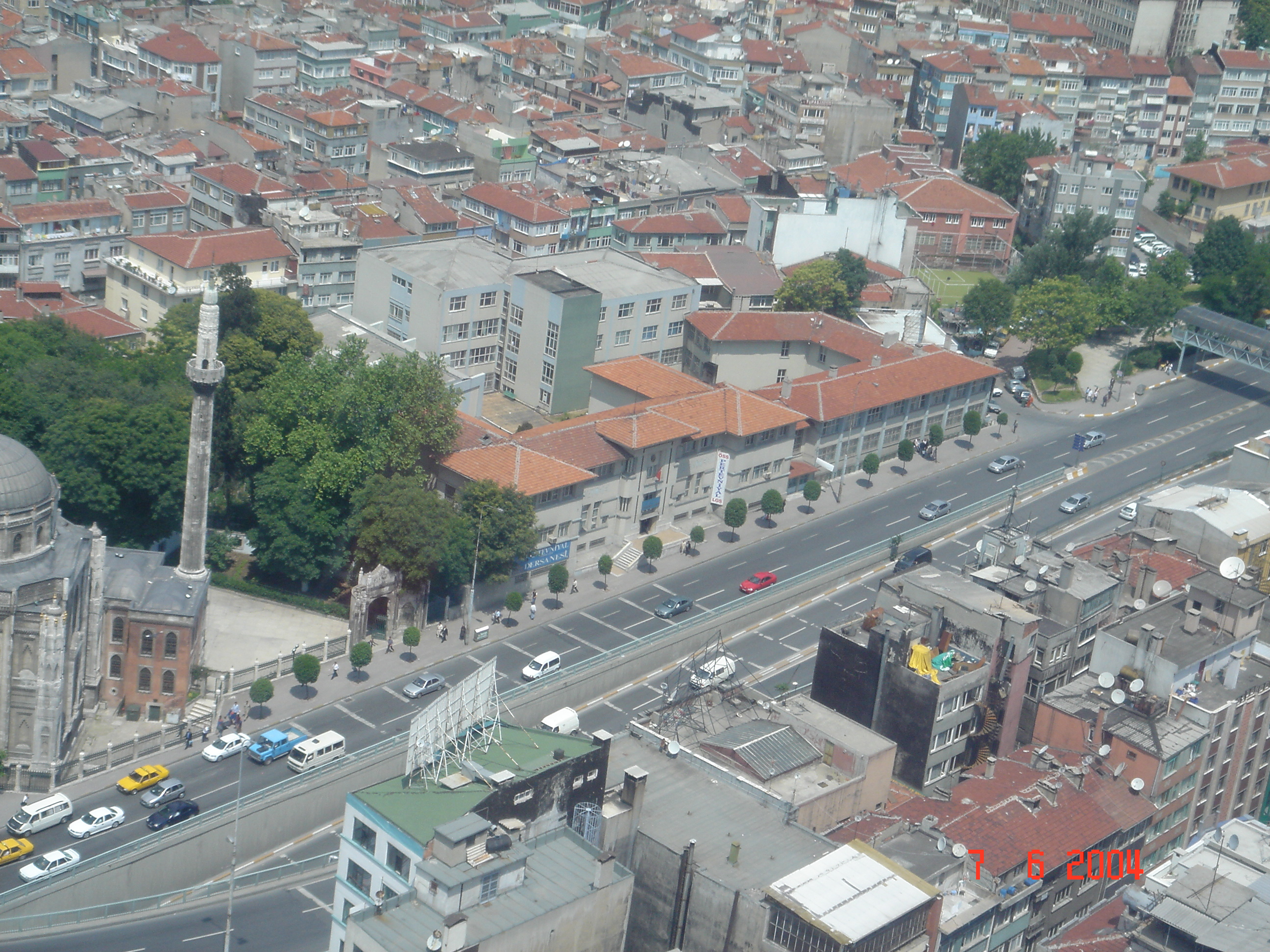 Pertevniyal Anadolu Lisesi'nin havadan görünümü.